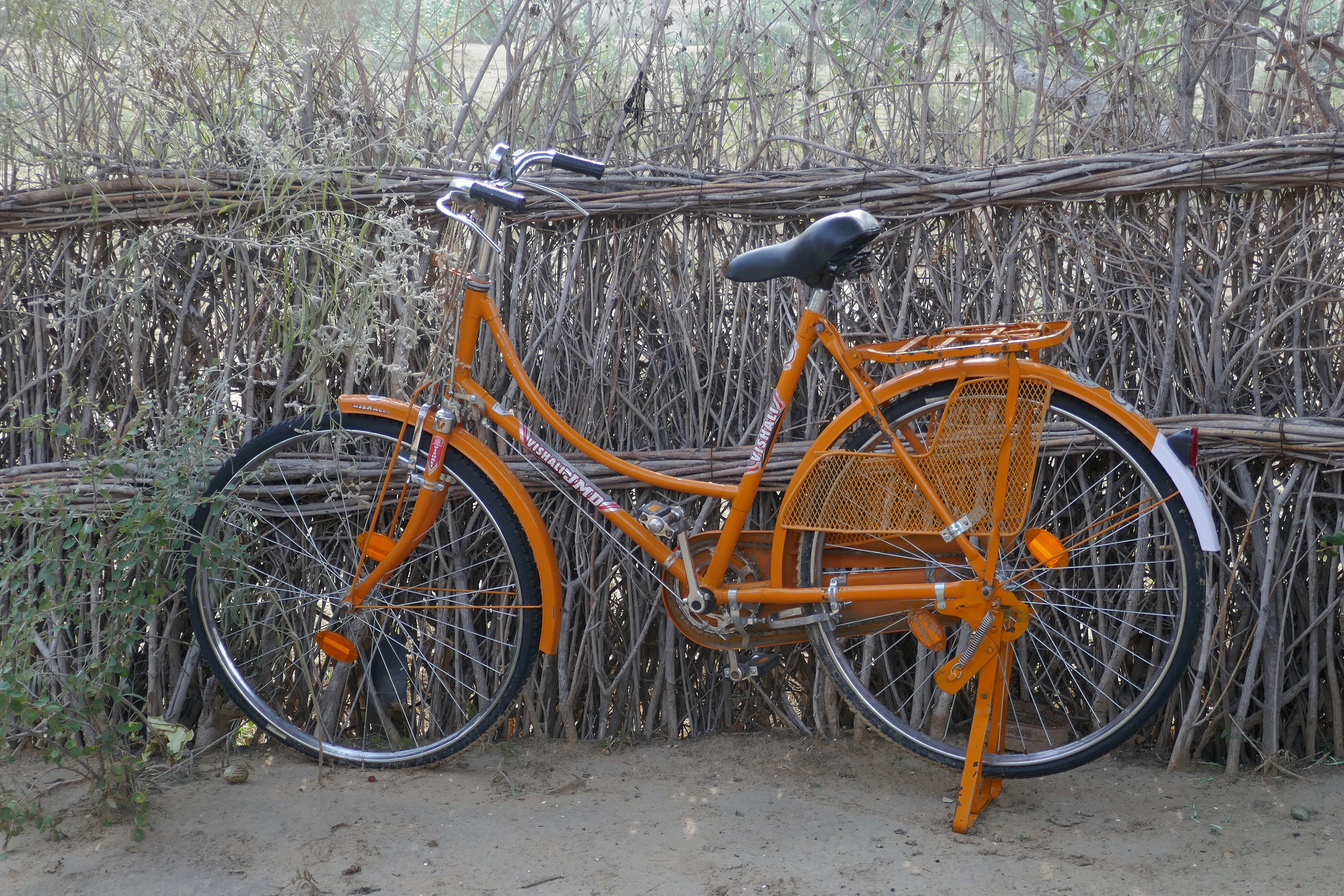 Bicyclette orange attribuée, par un programme gouvernemental mis en place en 2006, aux jeunes filles pour les encourager à aller au collège (désert du Thar, Rajasthan)